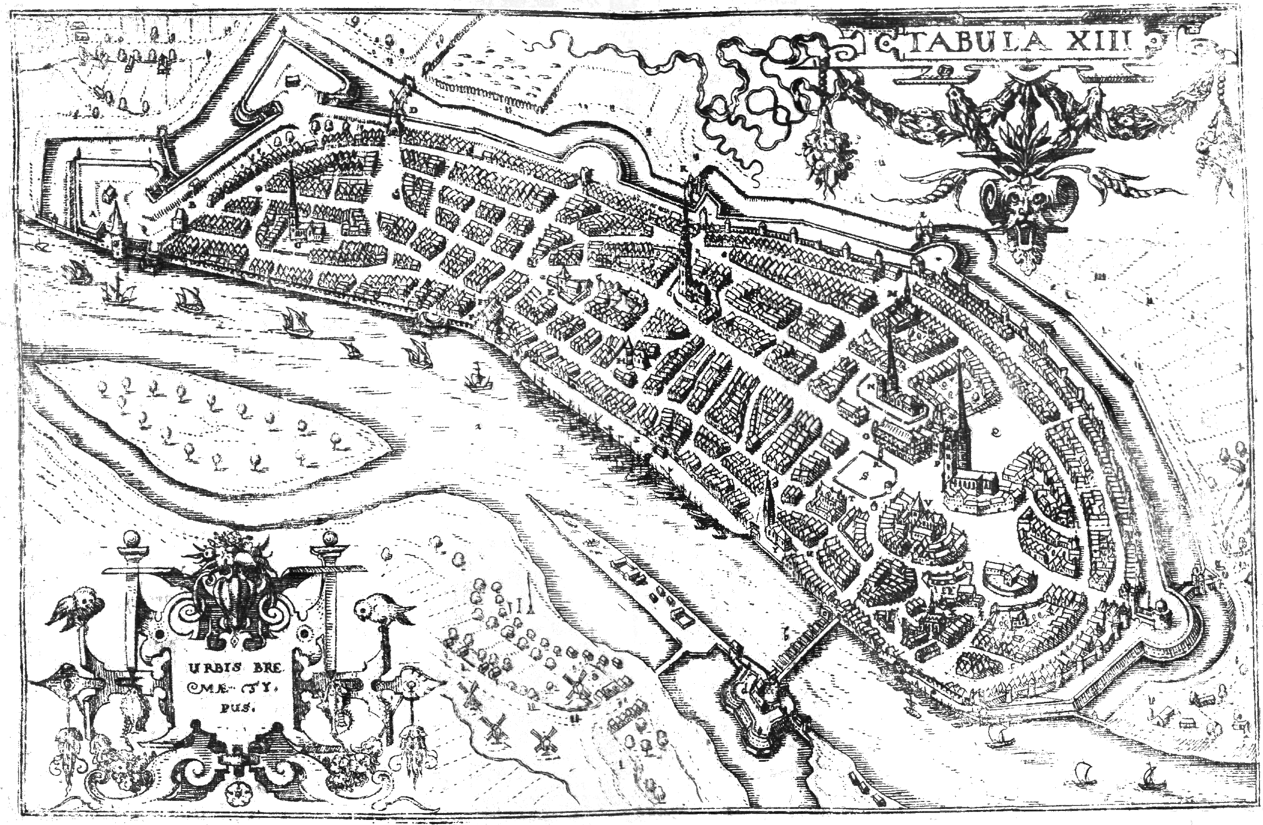 Dilich Urbis Bremae et praefecturarum …, TABVLA XIII Urbis Bremæ typus